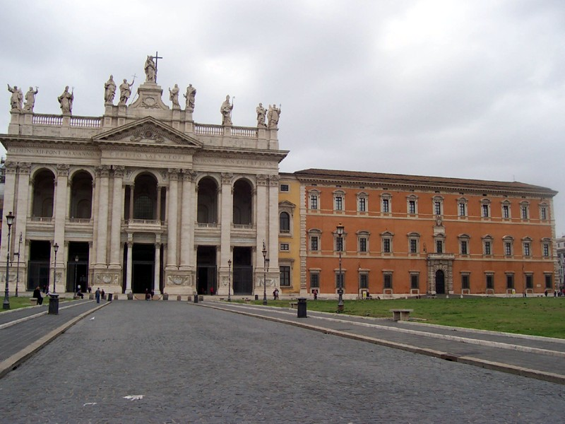 Roma - Basilica di S. Giovanni in Laterano e Palazzo Lateranense